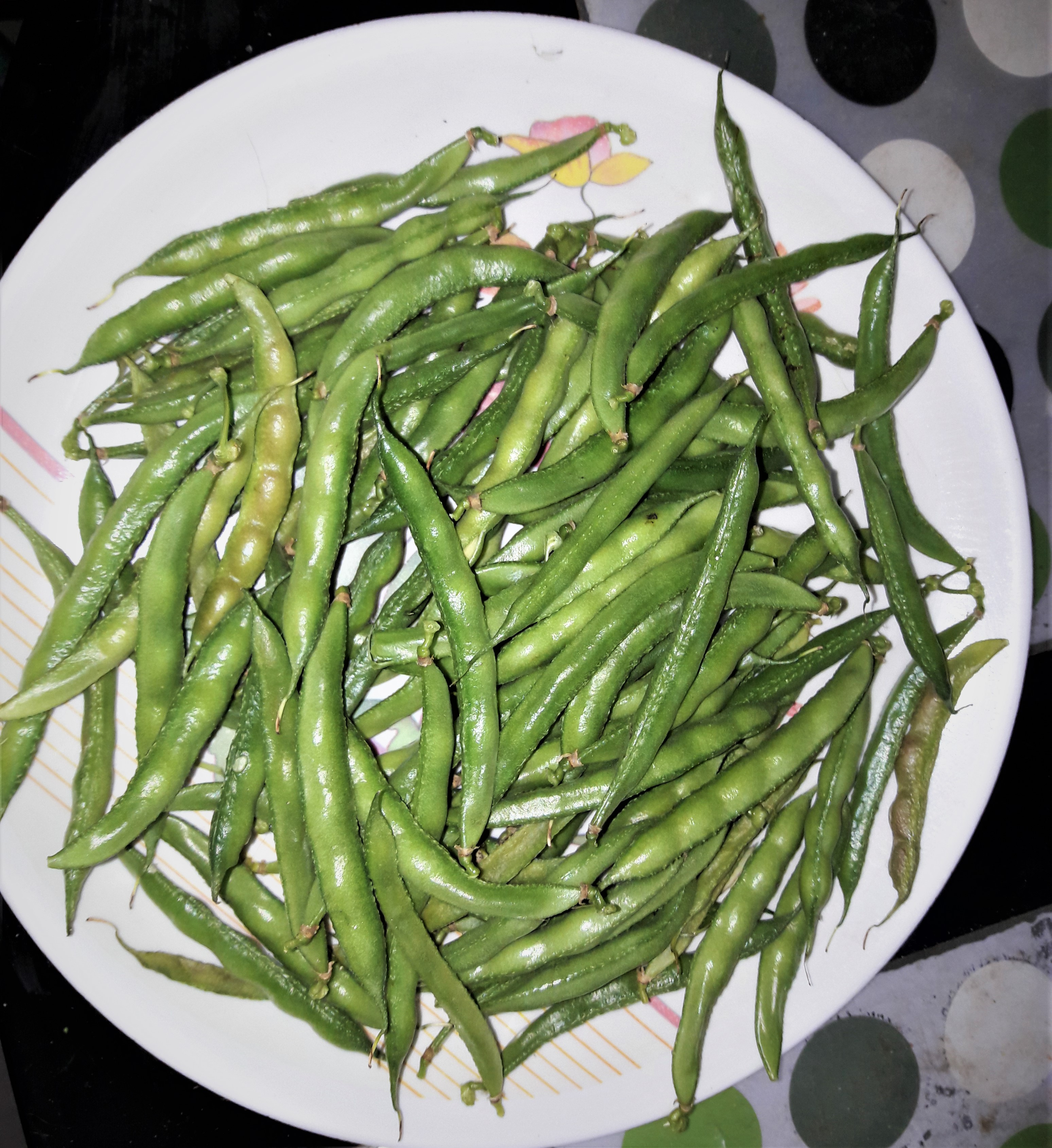 చిక్కుడు కాయలు